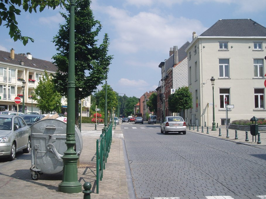 chaussée de Tervueren à Sainte-Anne Auderghem Belgium